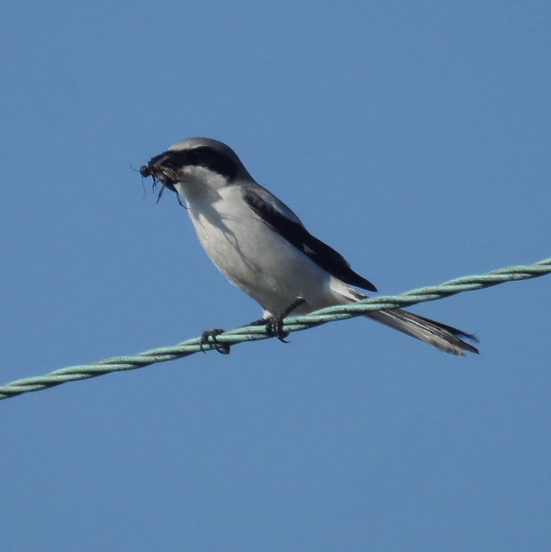 Loggerhead Shrike